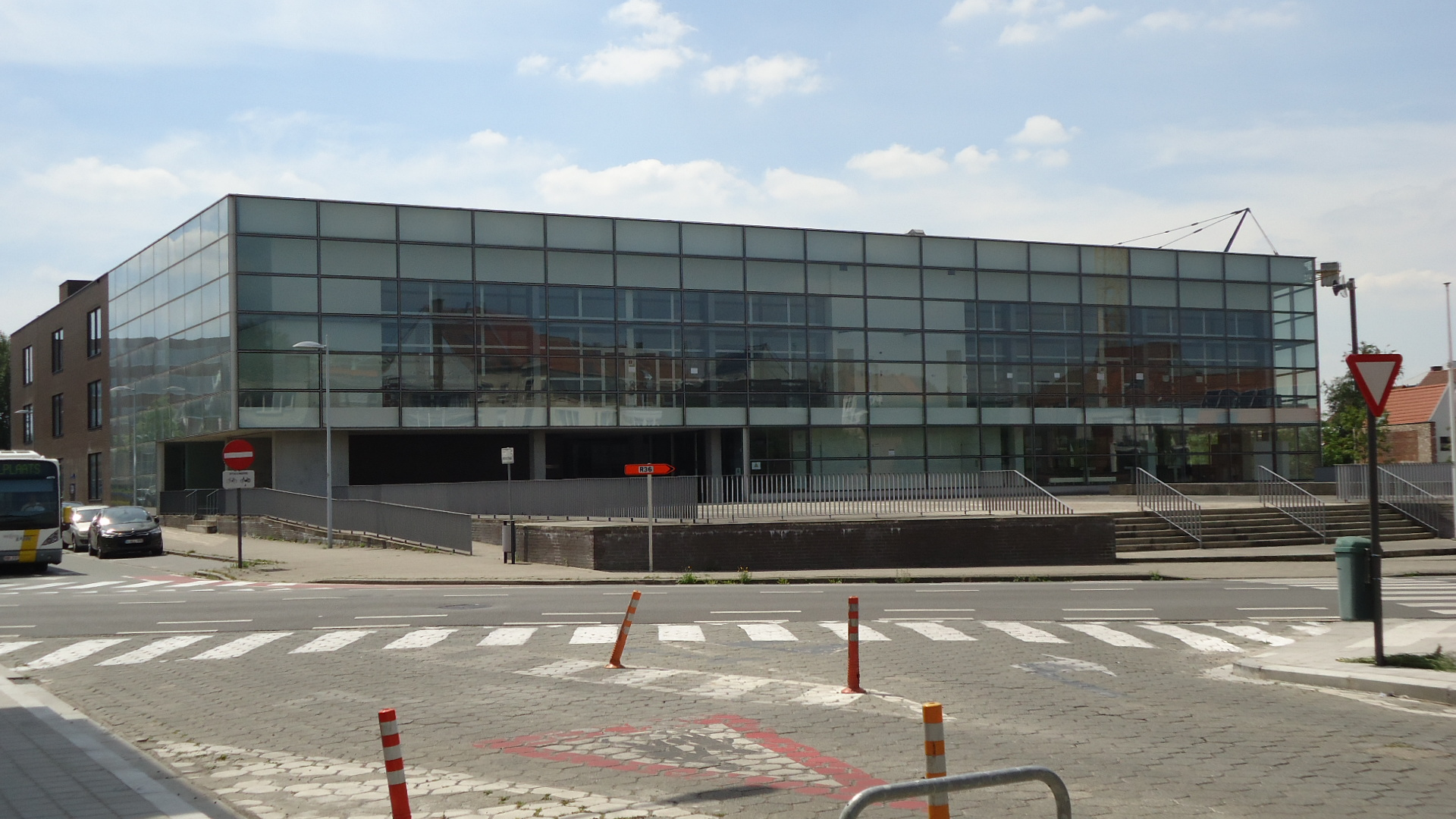 Het gebouw bevindt zich in de Beheersstraat in Kortrijk rechtover het Justitiehuis